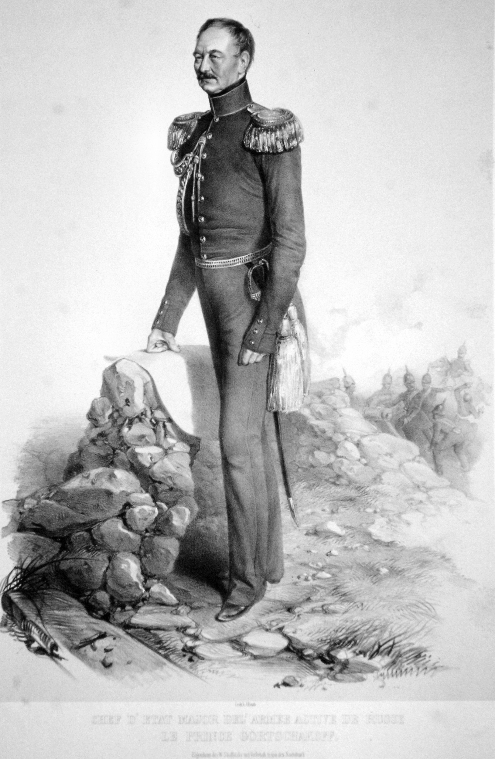 Michael Gortschakow, Lithographie von August Strixner, ca. 1849